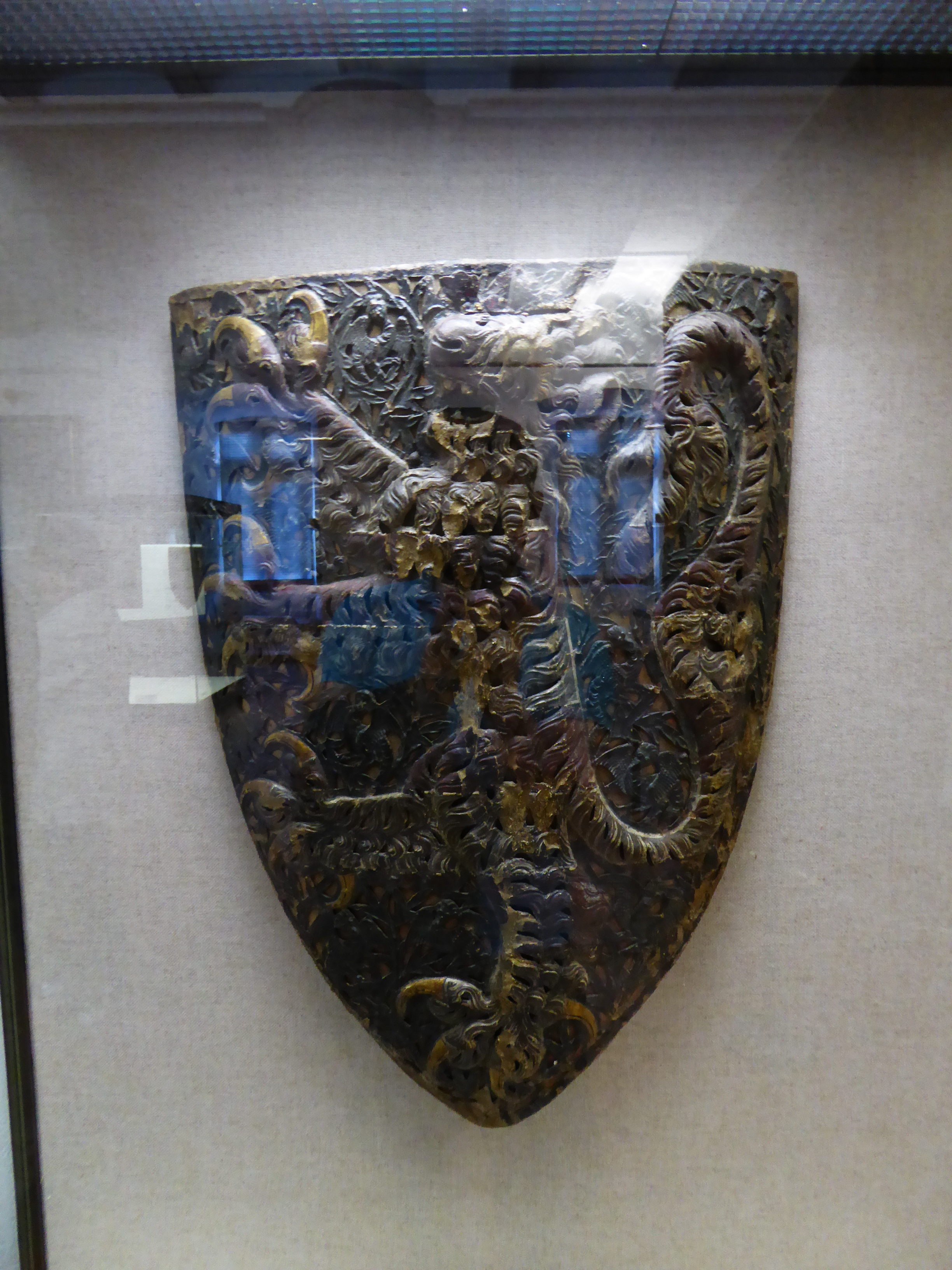 Schild des Landgrafen Heinrich von Hessen; ausgestellt im Marburger Schloss Hessen, wohl zwischen 1292 und 1308